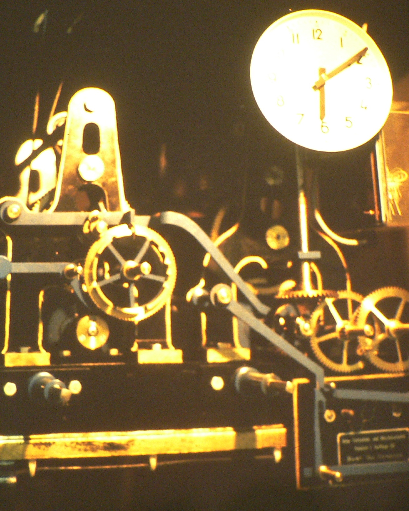 Uhrwerk der St. Matthäus Kirche in Melle; Hersteller Uhrenfabrik Korffhage Melle Buer